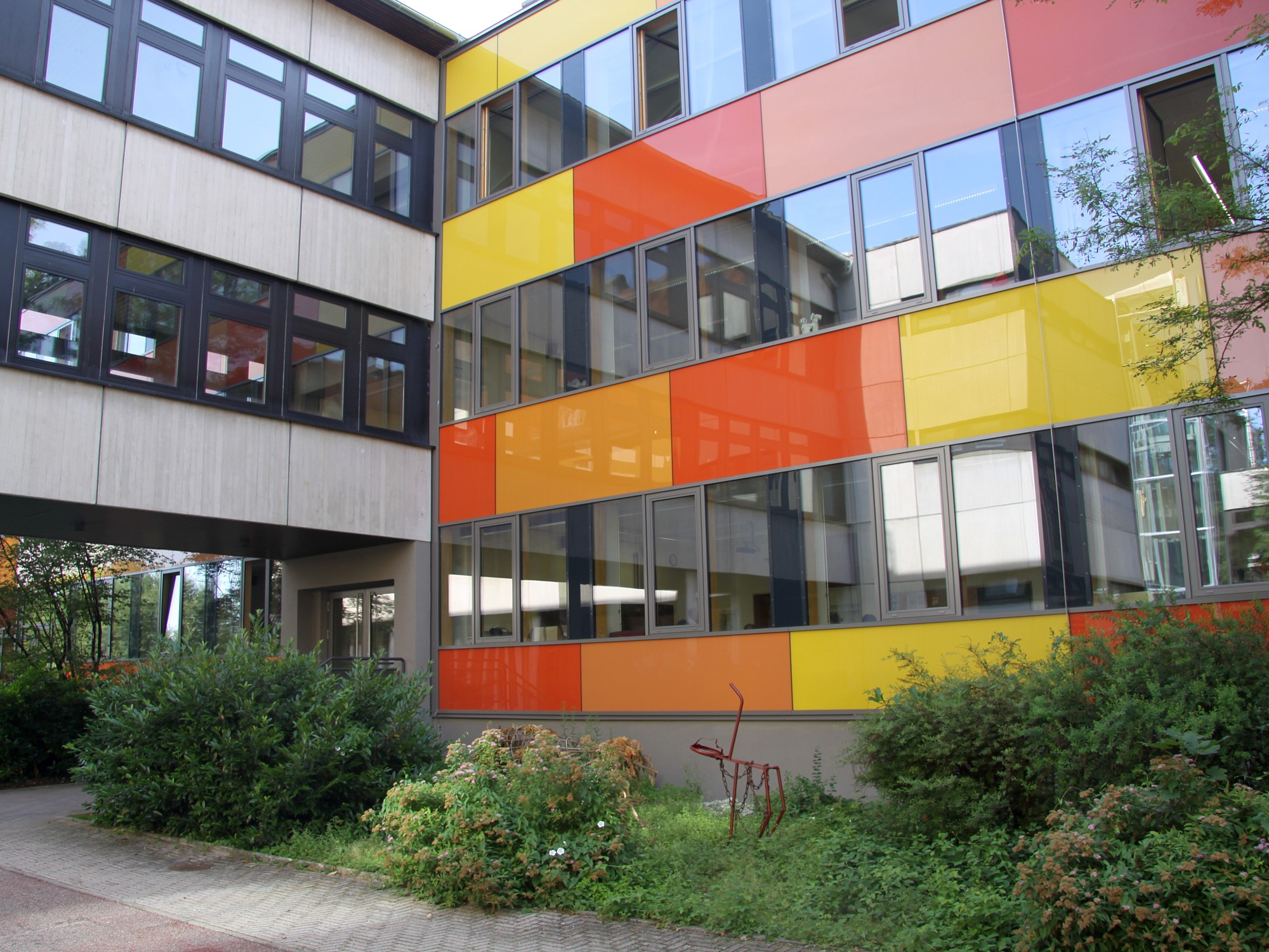 Luitpold-Gymnasium Wasserburg am Inn - Bayern - Deutschland